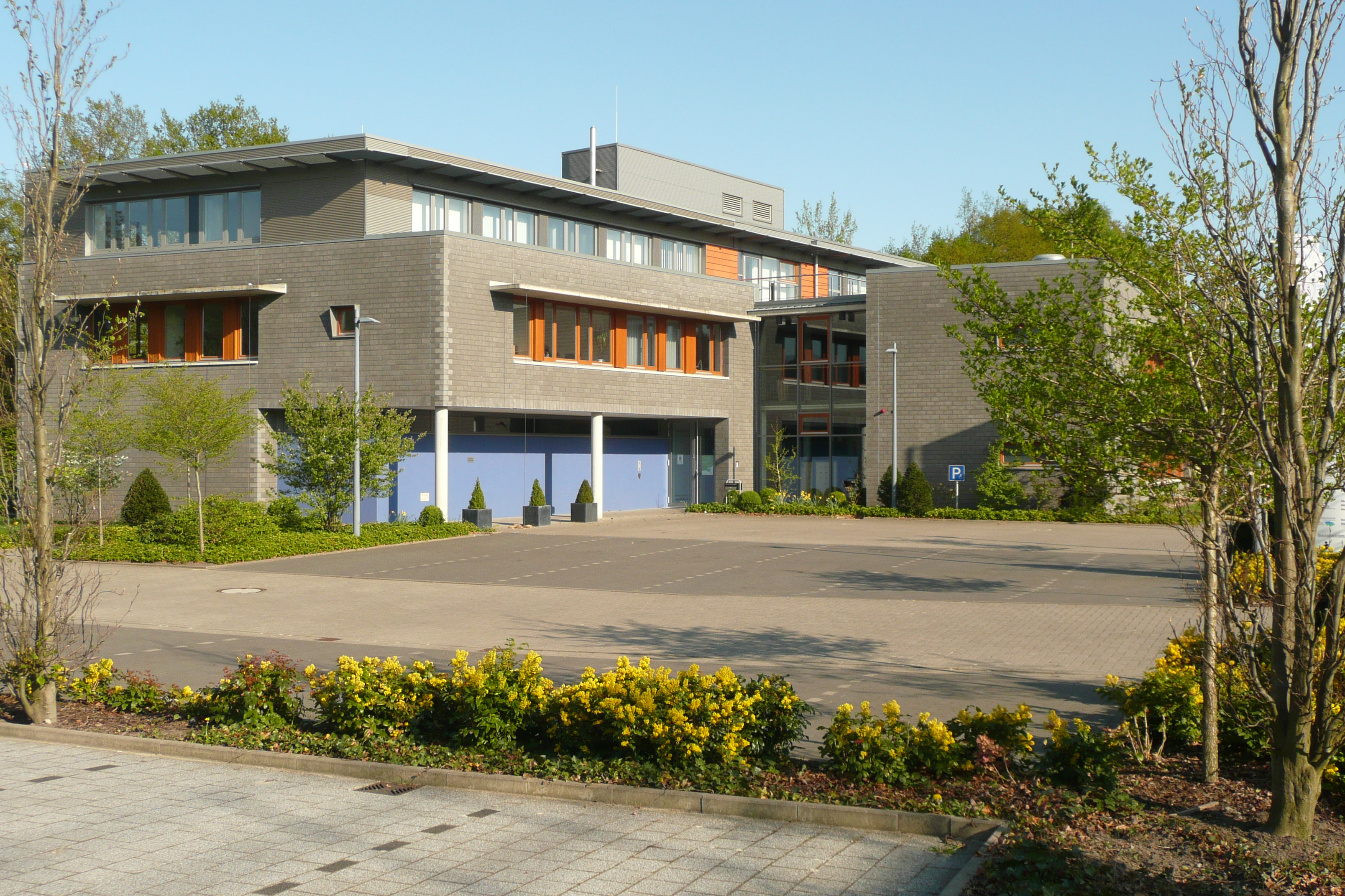 Gebäude des Hörzentrums Oldenburg, einem An-Institut der Carl von Ossietzky Universität